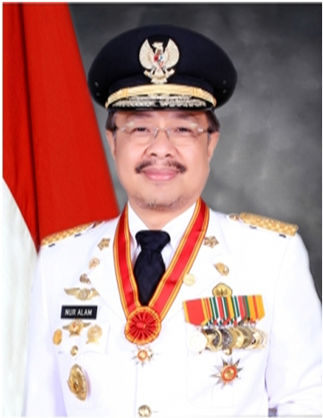 Nur Alam, Gubernur Sulawesi Tenggara